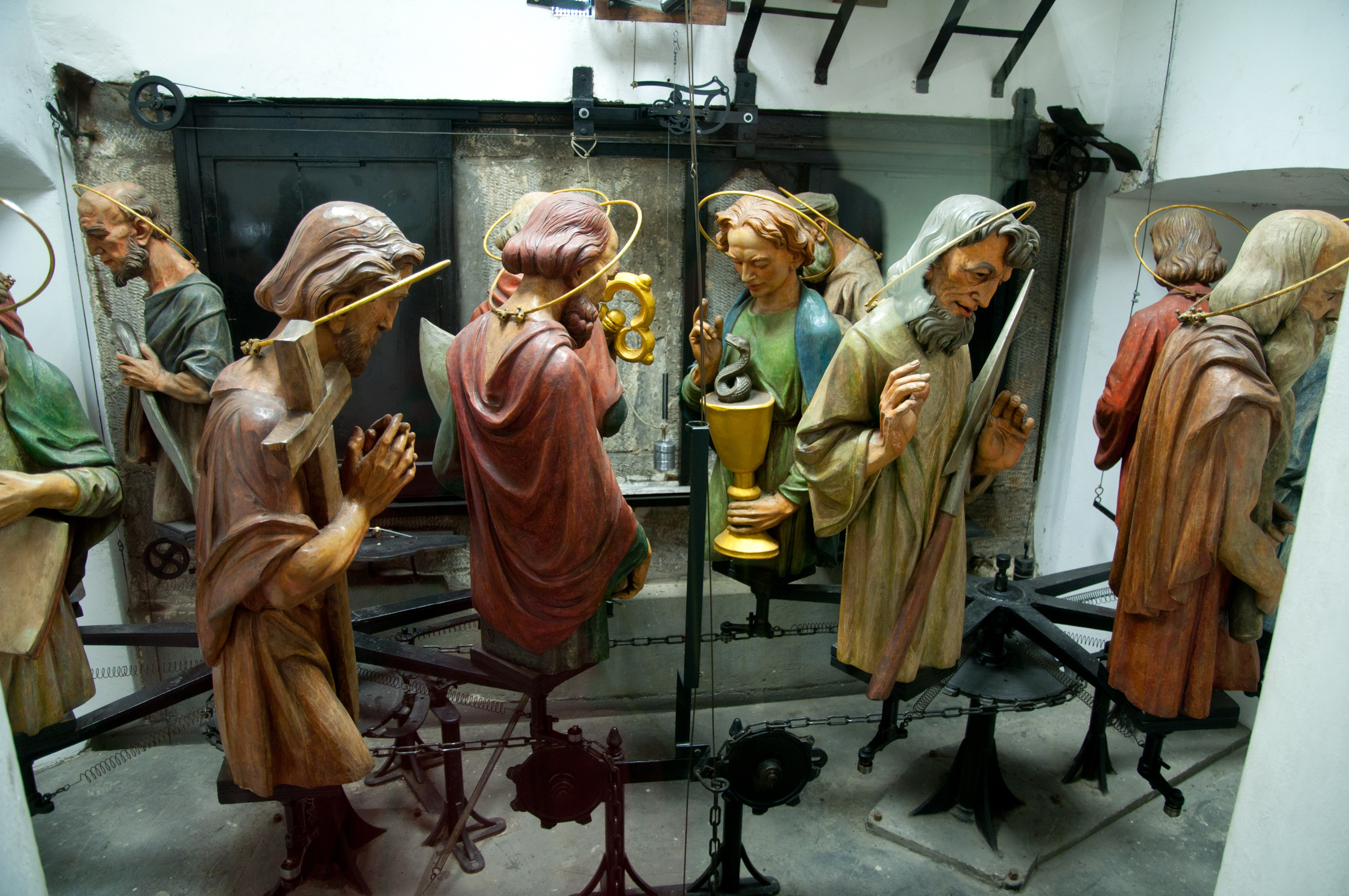 Turm des Prager Rathauses (Apostel im Inneren)